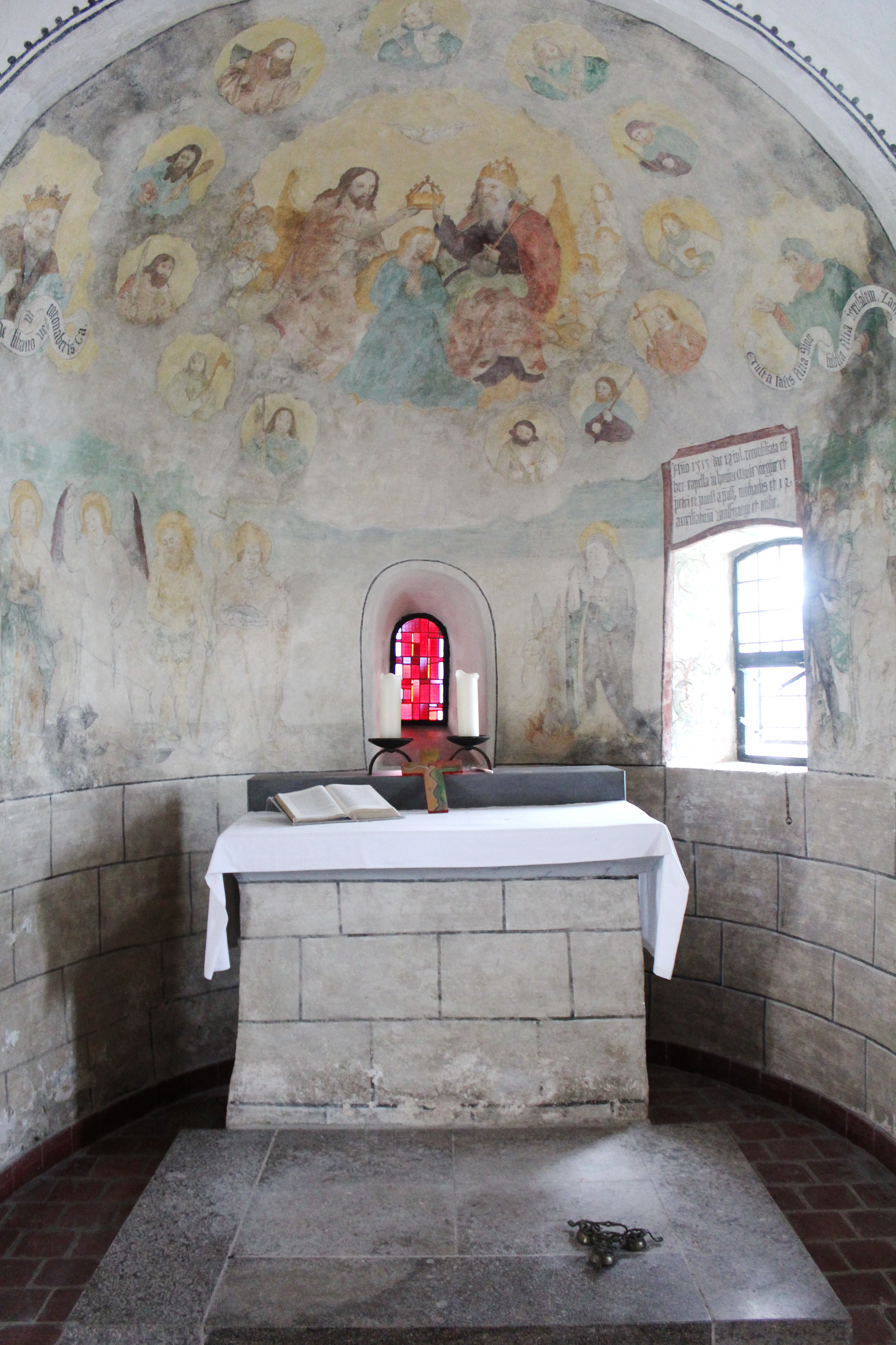 Weithin sichtbar über dem alten Stadtkern auf der Südseite der Burg Veringen in Veringenstadt steht eine romanische Kapelle. Sie ist den Heiligen Petrus und Paulus geweiht, wird aber von alters her allgemein Peterskapelle oder im Volksmund Peterskirchle genannt. Die Erbauung geht in das 10. oder 11. Jahrhundert zurück.